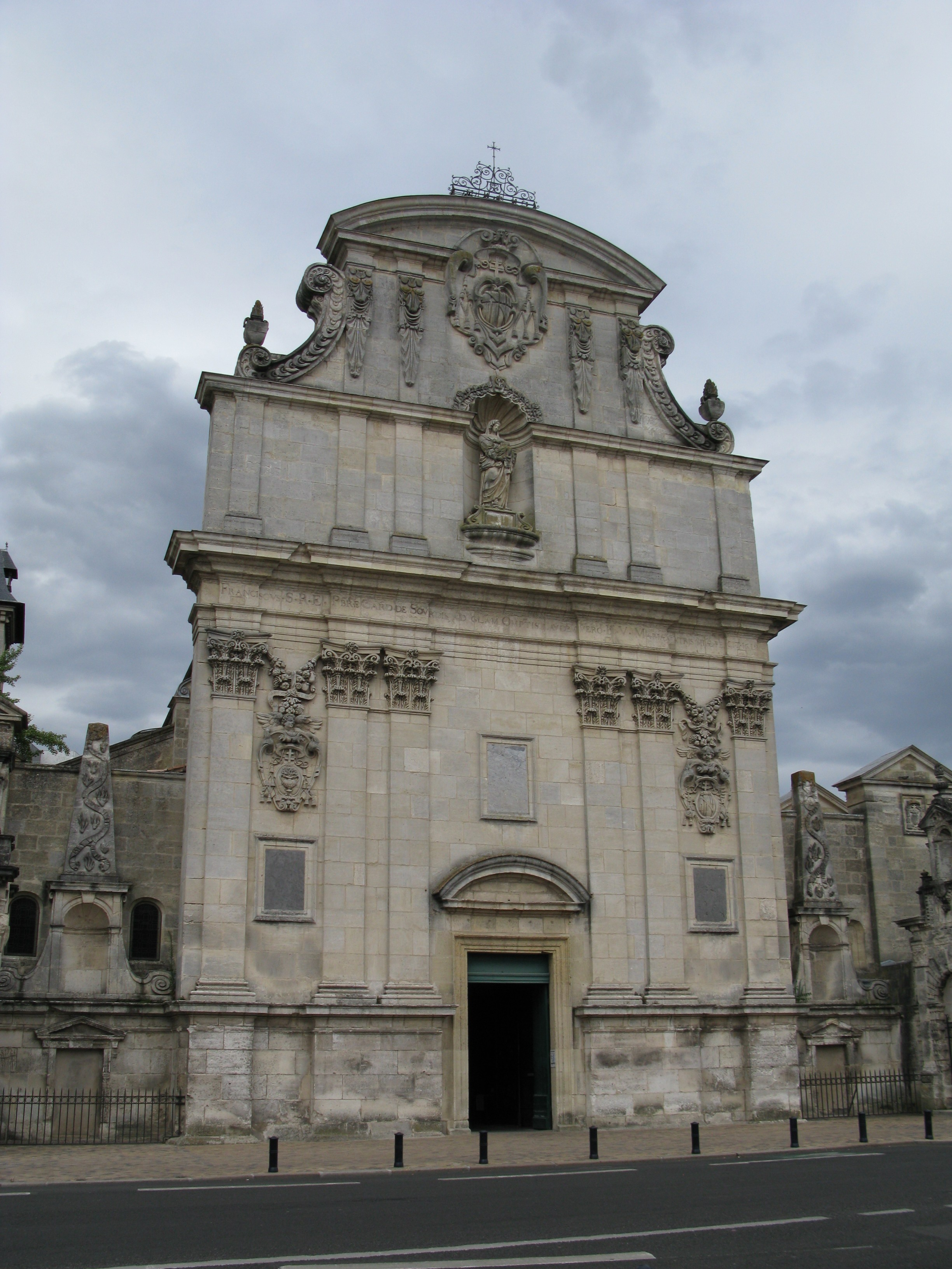 La façade de l'église Saint-Bruno, Bordeaux en face du cimetière de la chartreuse.